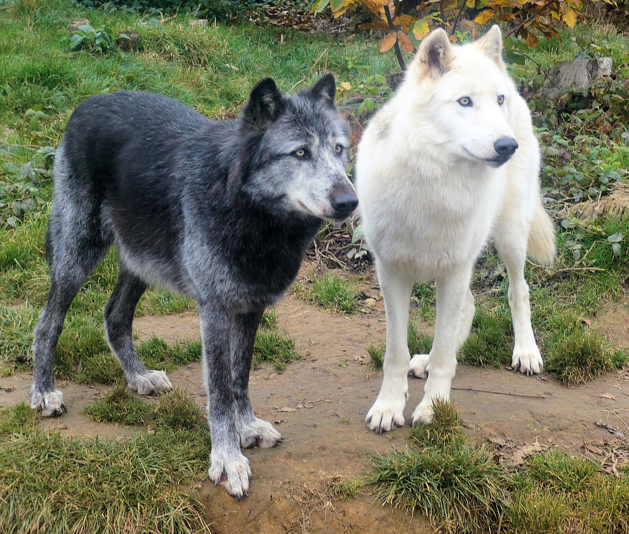 Black and white wolf - subspecies Canis lupus occidentalis, Zoo La Boissière-du-Doré in Pays de la Loire, France.